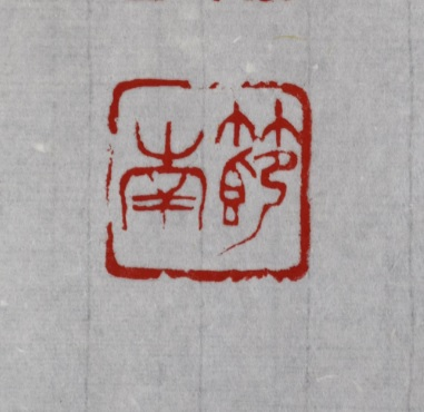 二世中村蘭台作 自用印